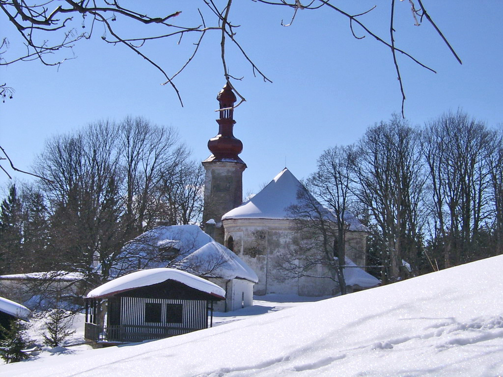 Anenský vrch, 860 m n. m., severozápadně od Andělské Hory (okres Bruntál).